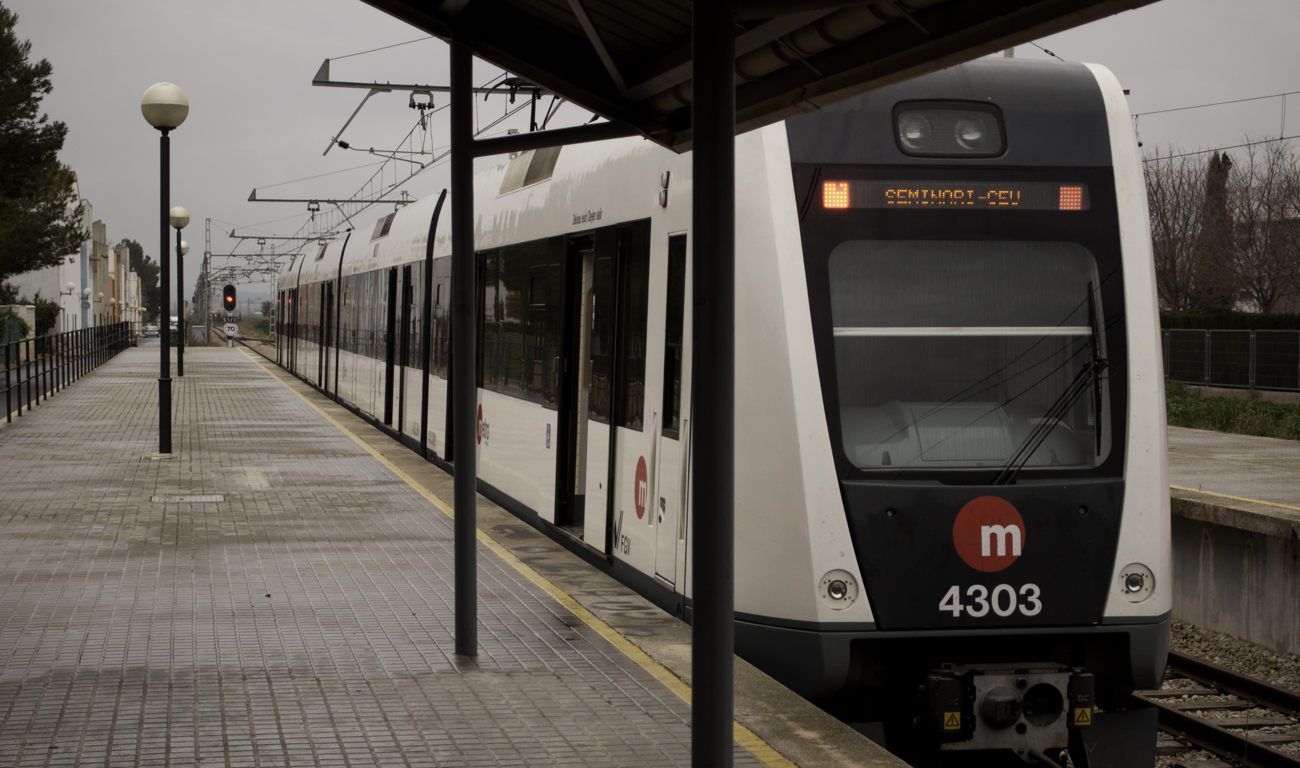 Unidad de la serie 4300 de Metro de Valencia en la estación de Villanueva de Castellón